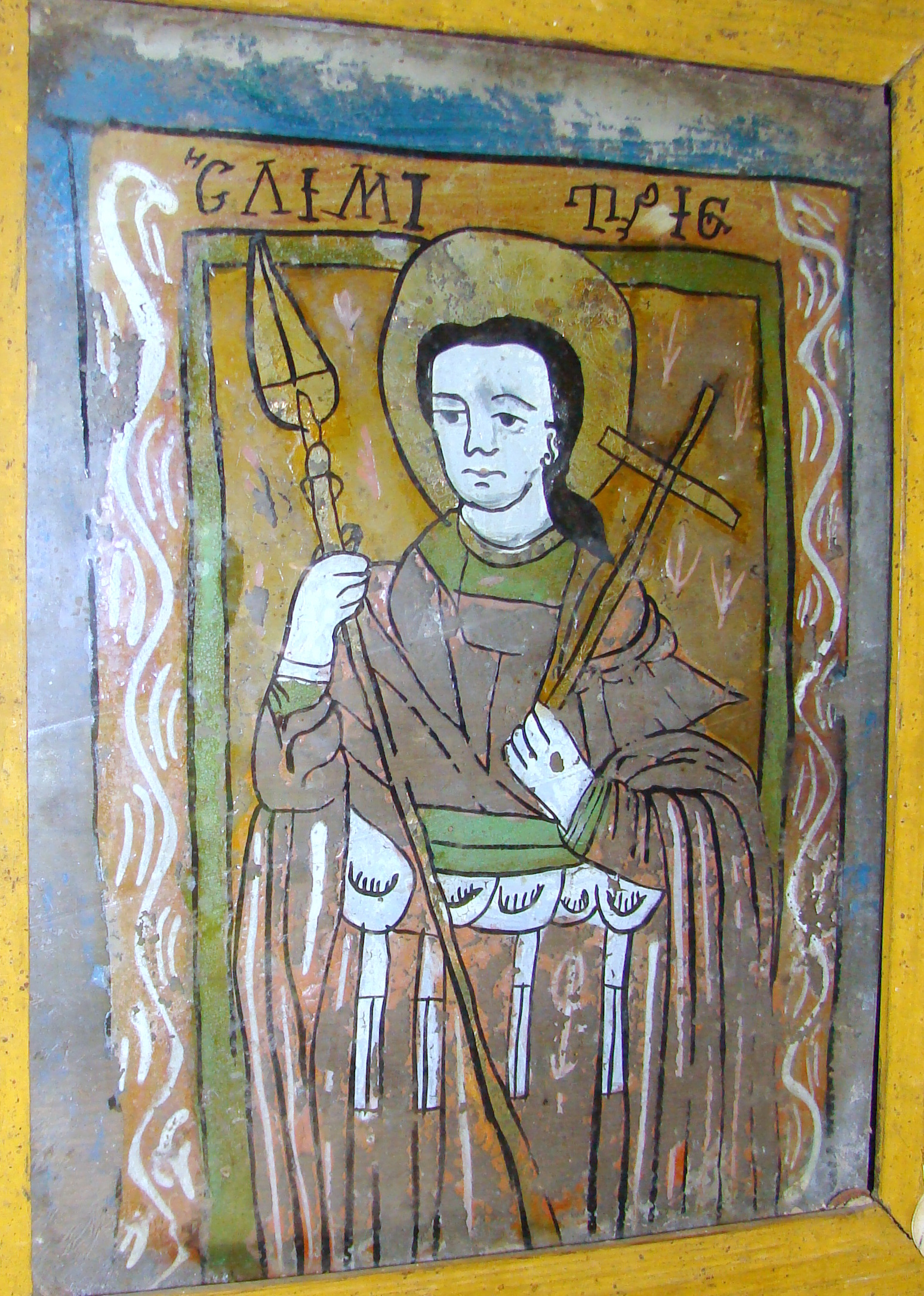 Biserica de lemn din Tinca, județul Bihor